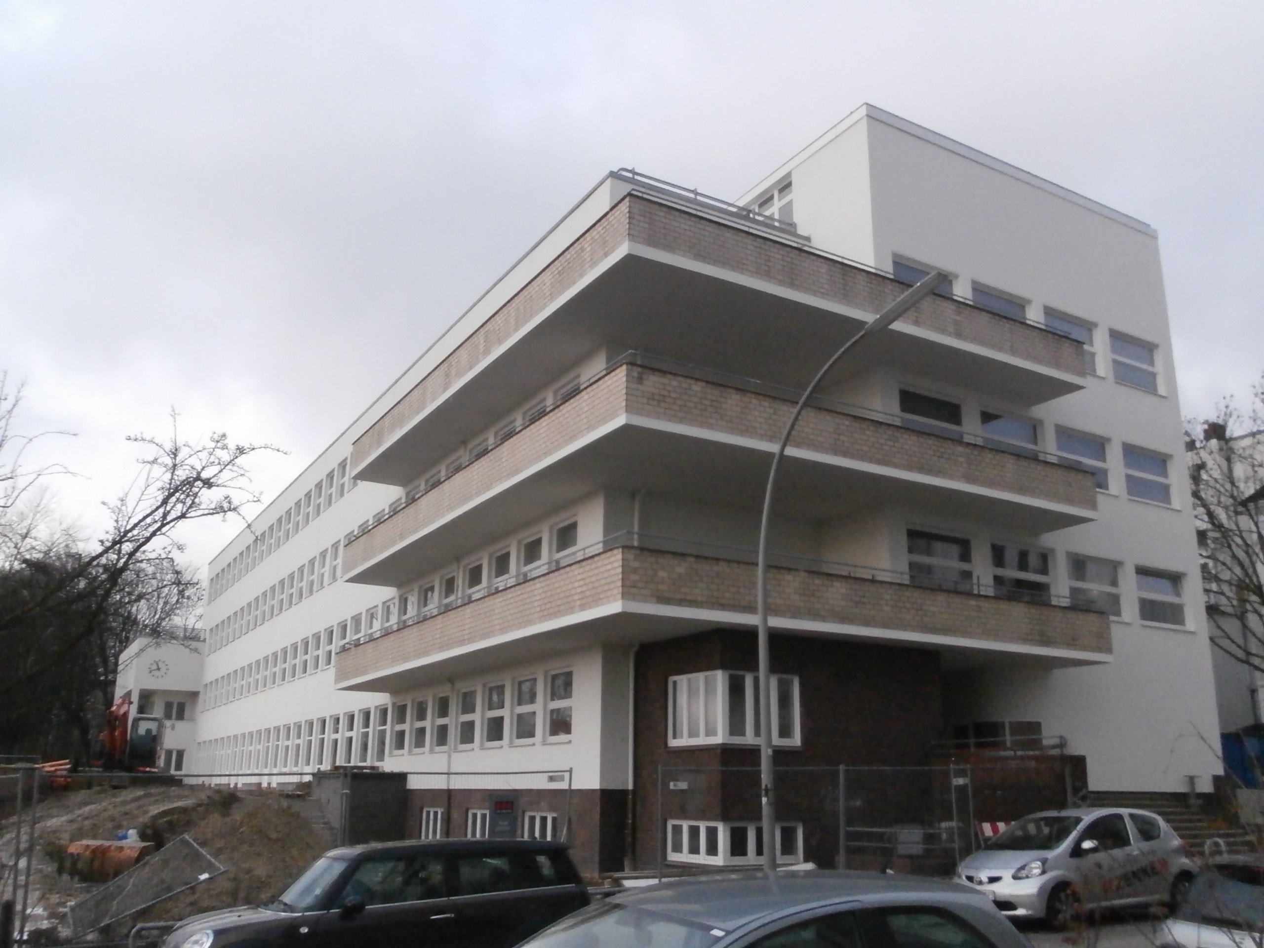 Ehemalige Seefahrtschule AltonaThis is a photograph of an architectural monument.